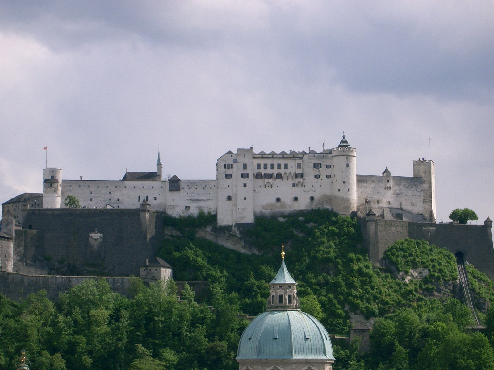 View of Festung Hohensalzburg From Kapuzinerberg